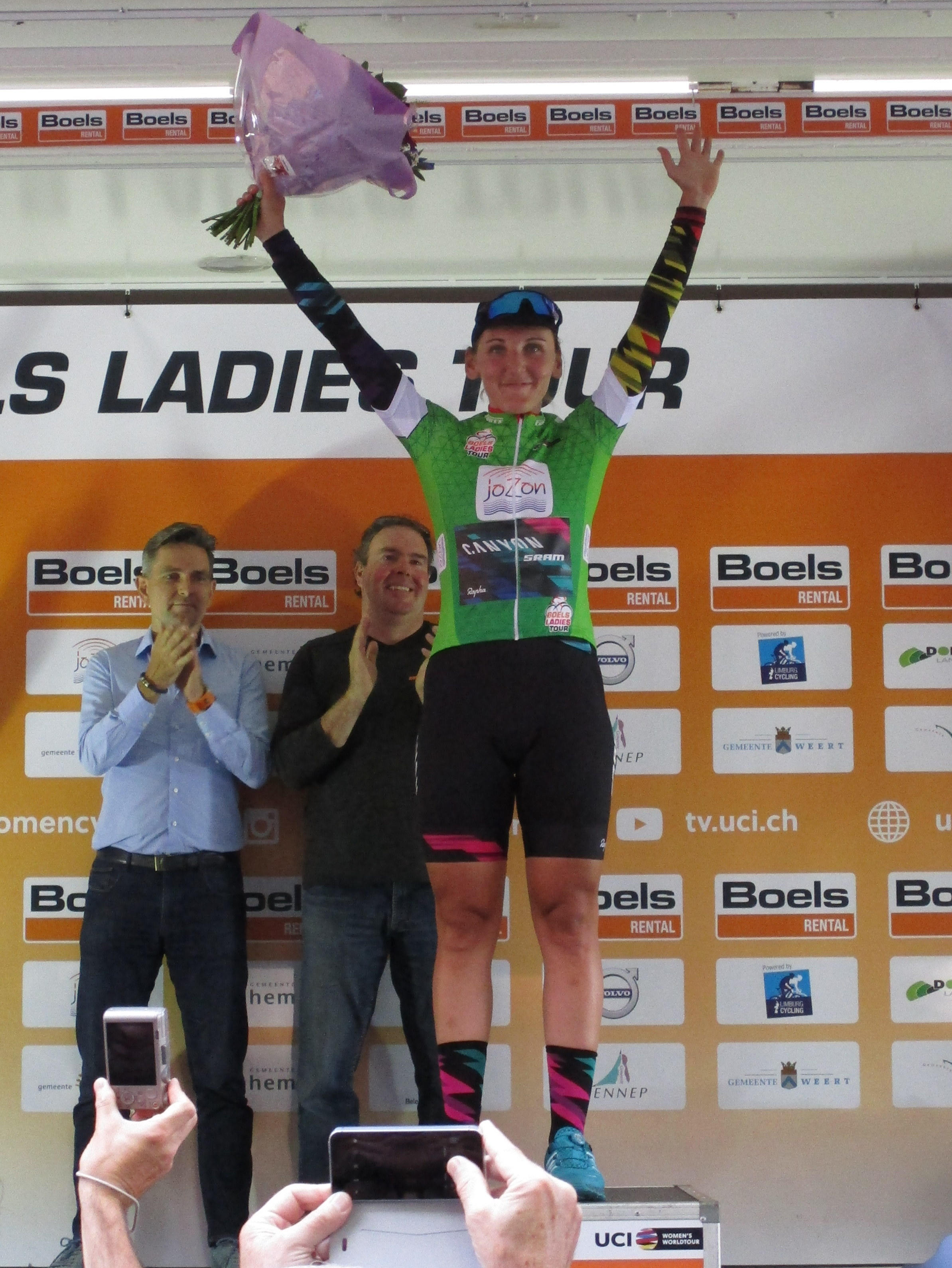 Huldiging van de winnaars van de 4e etappe van de Boels Ladies Tour 2017 in Weert.